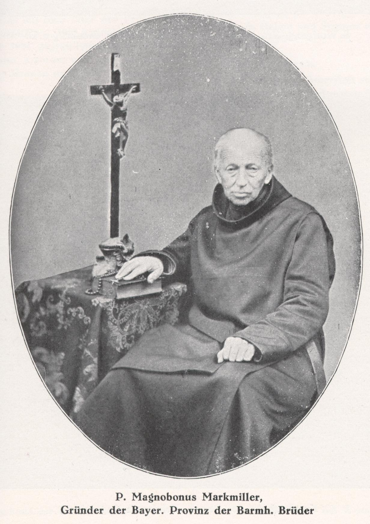 Magnobonus Markmiller, Gründer der bayerischen Provinz der Barmherzigen Brüder des Hl. Johannes von Gott